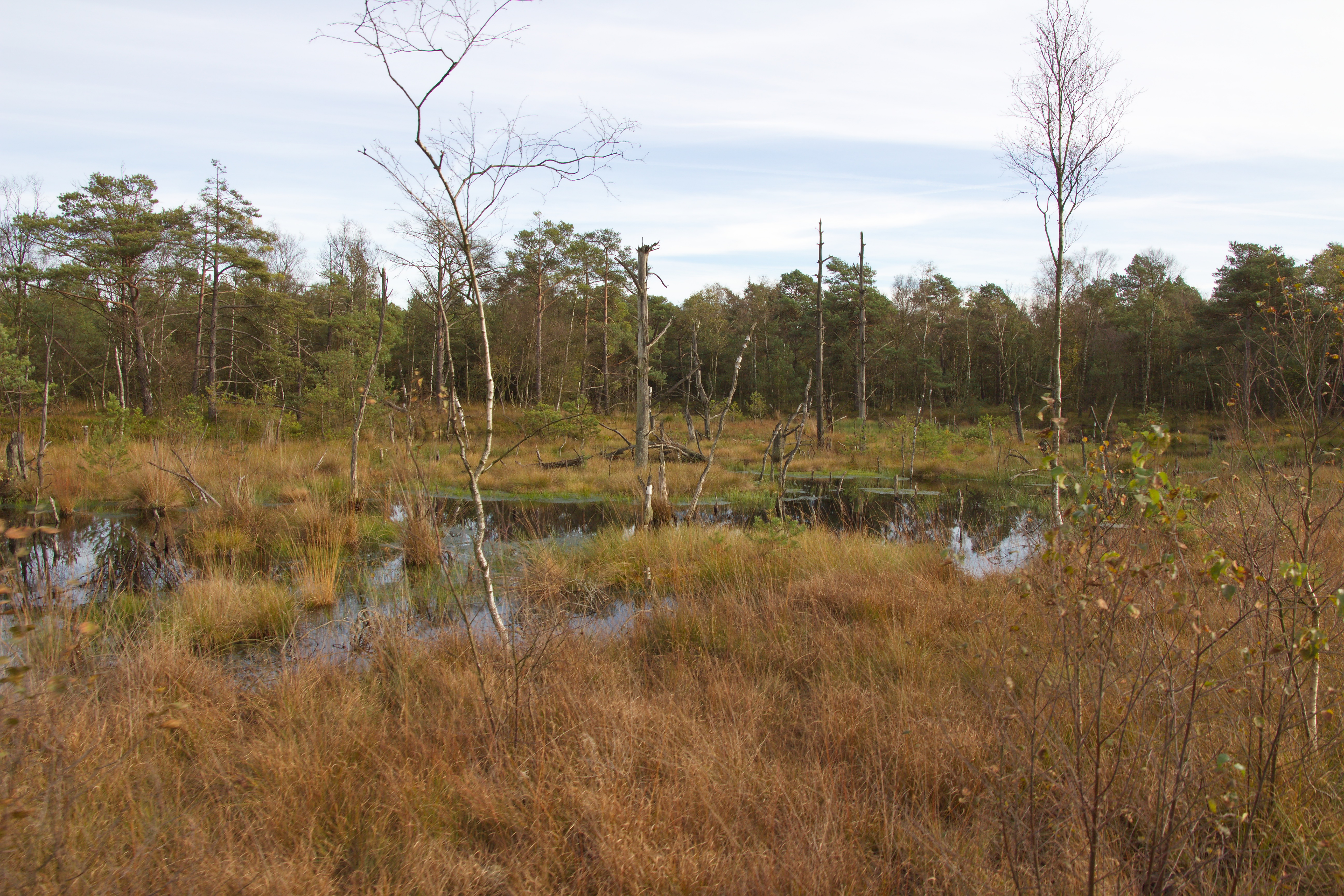 Pietzmoor in der Lüneburger Heide bei Schneverdingen, Niedersachsen, Deutschland